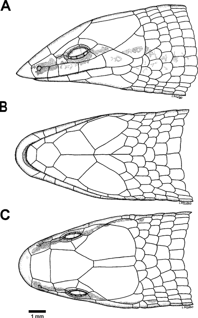 Representação da cabeça de B. oxyrhina e detalhes do fucinho e escama